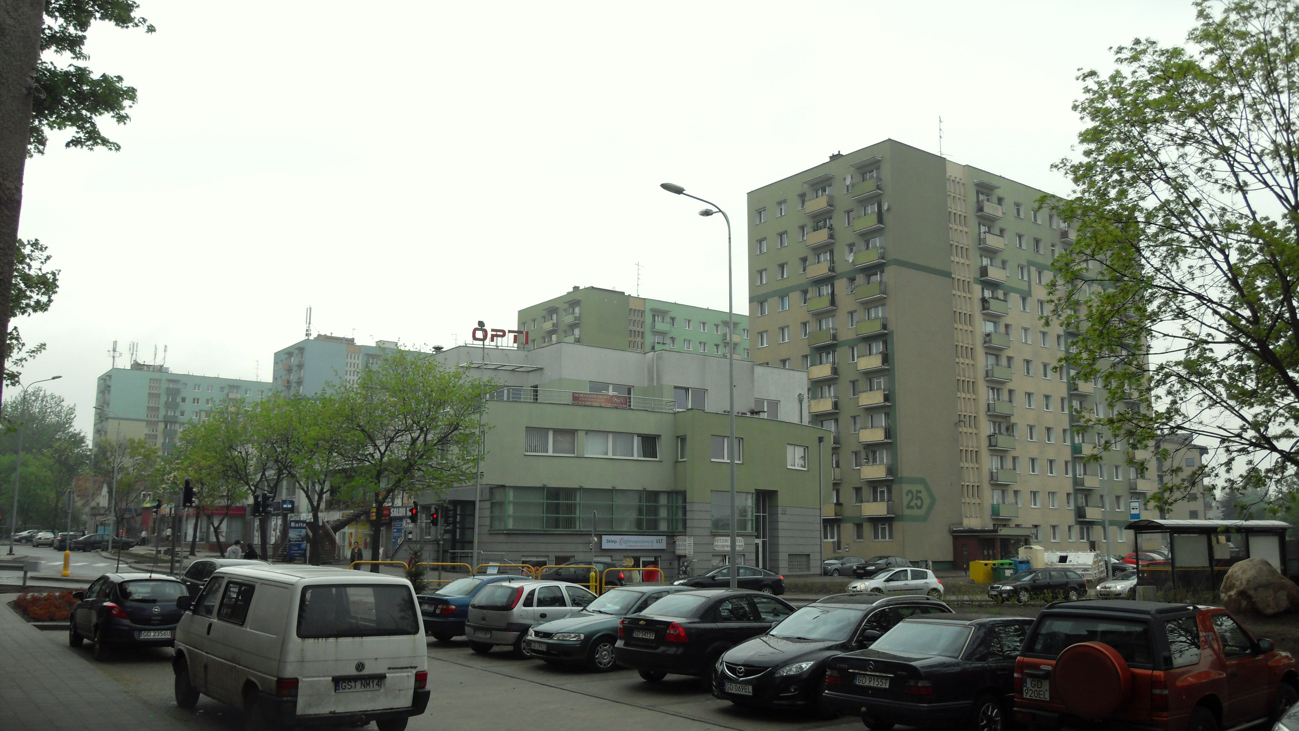 Gdańsk Wrzeszcz Górny, ul. Słowackiego 25, 27, 29, 35, 37, 39, 45.